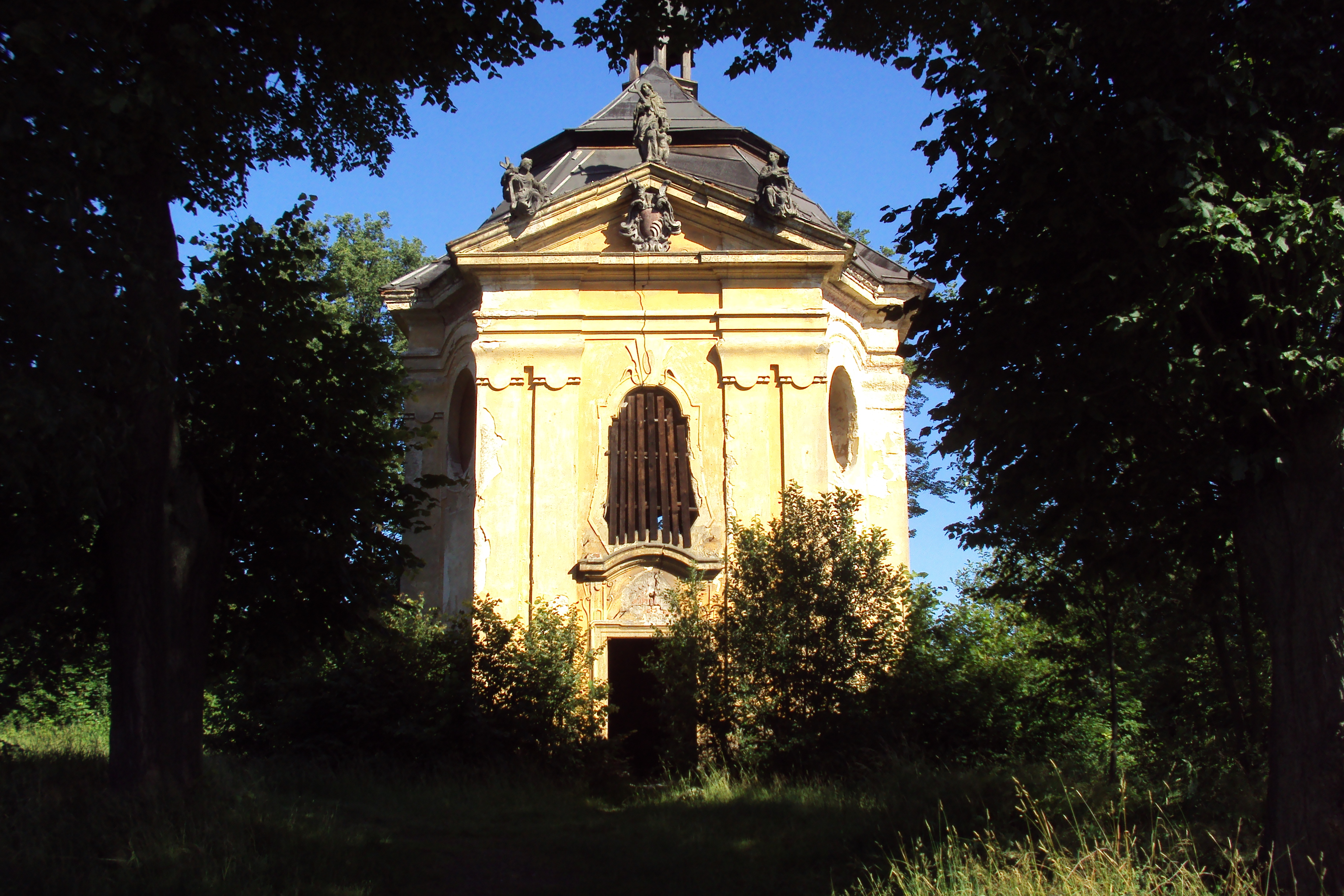 Kaple sv.Jana Nepomuckého při výpadovce ze Sloupu na Nový Bor